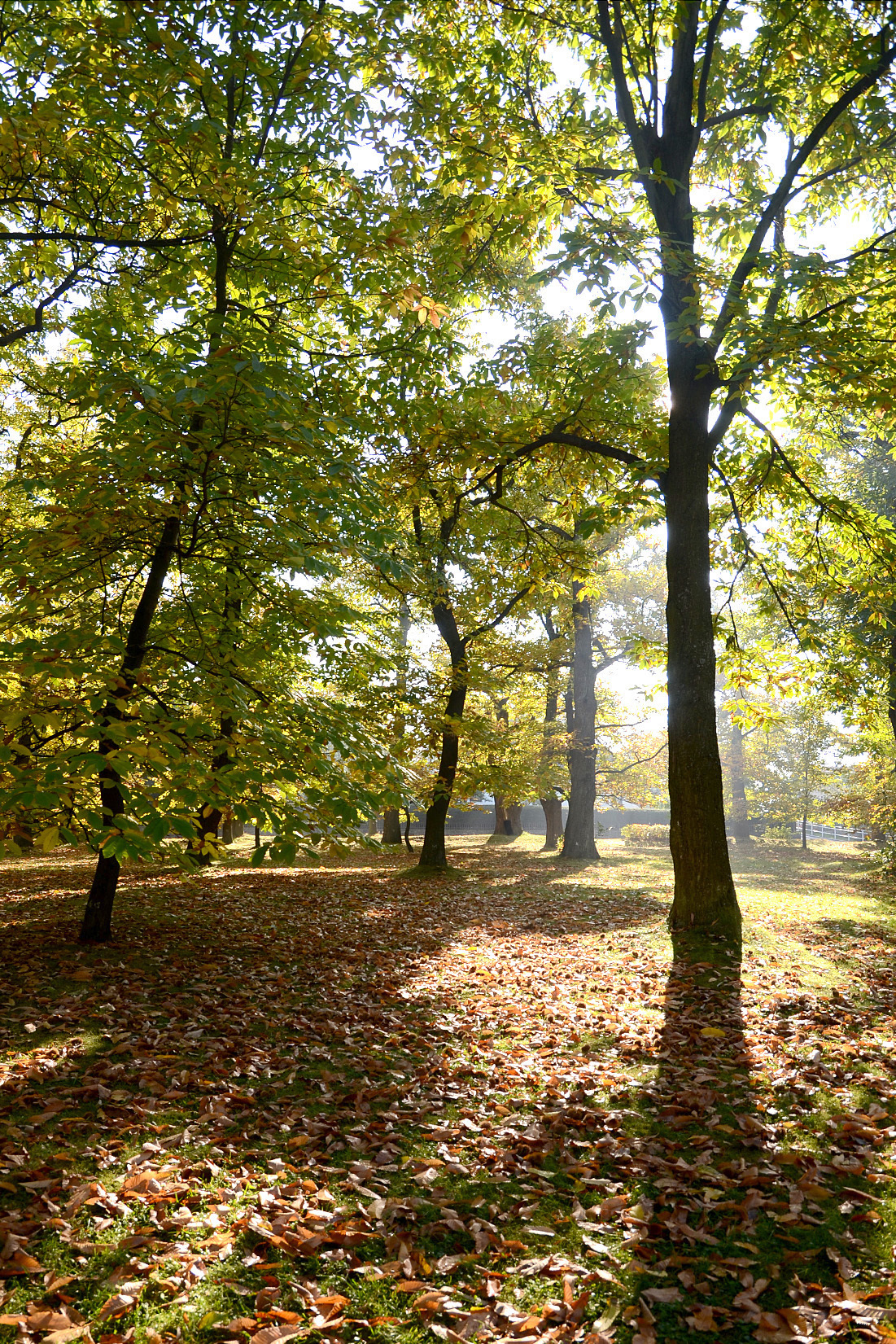 Kaštanka